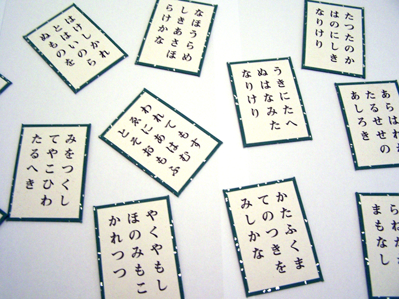 Cartes en kana du jeu japonais karuta